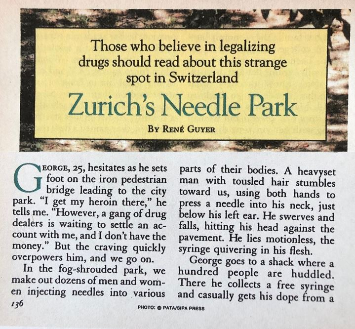 Artikel von Autor Hans Bosshard mit Pseudonym René Guyer über die Drogenszene auf dem Zürcher Platzspitz, wie er im Oktober 1991 in der amerikanischen Ausgabe von Reader’s Digest erschien.